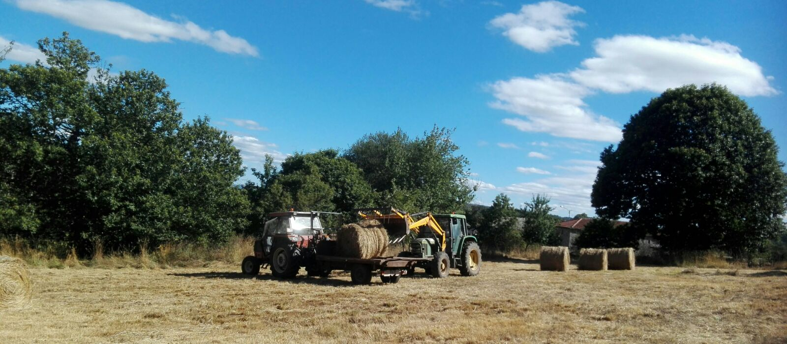 Traballos agrícolas no Barrio de Puga, parroquia de Pradeda, concello de Carballedo, Lugo